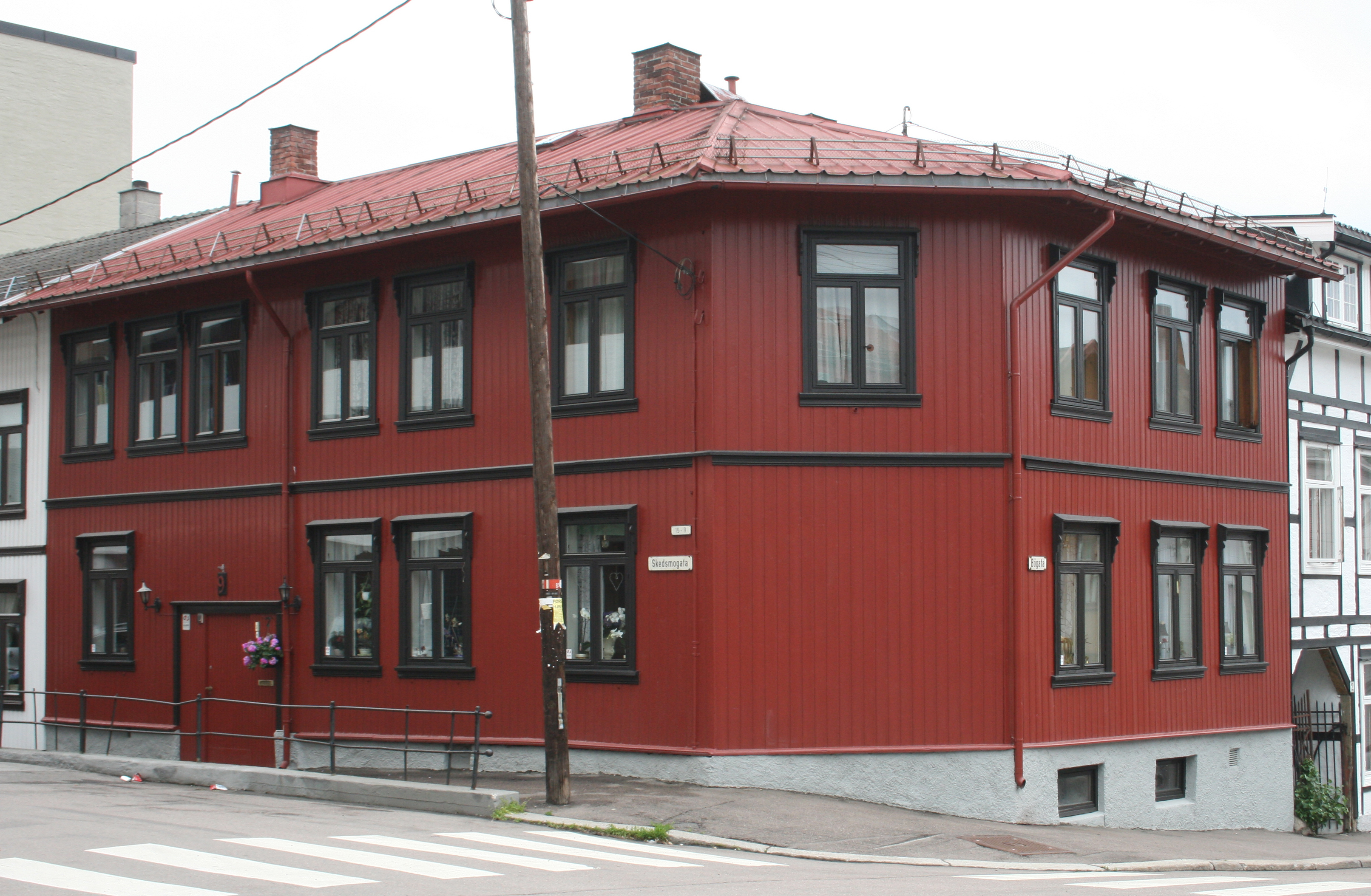 Skedsmogata 9, bolighus på Kampen i Oslo